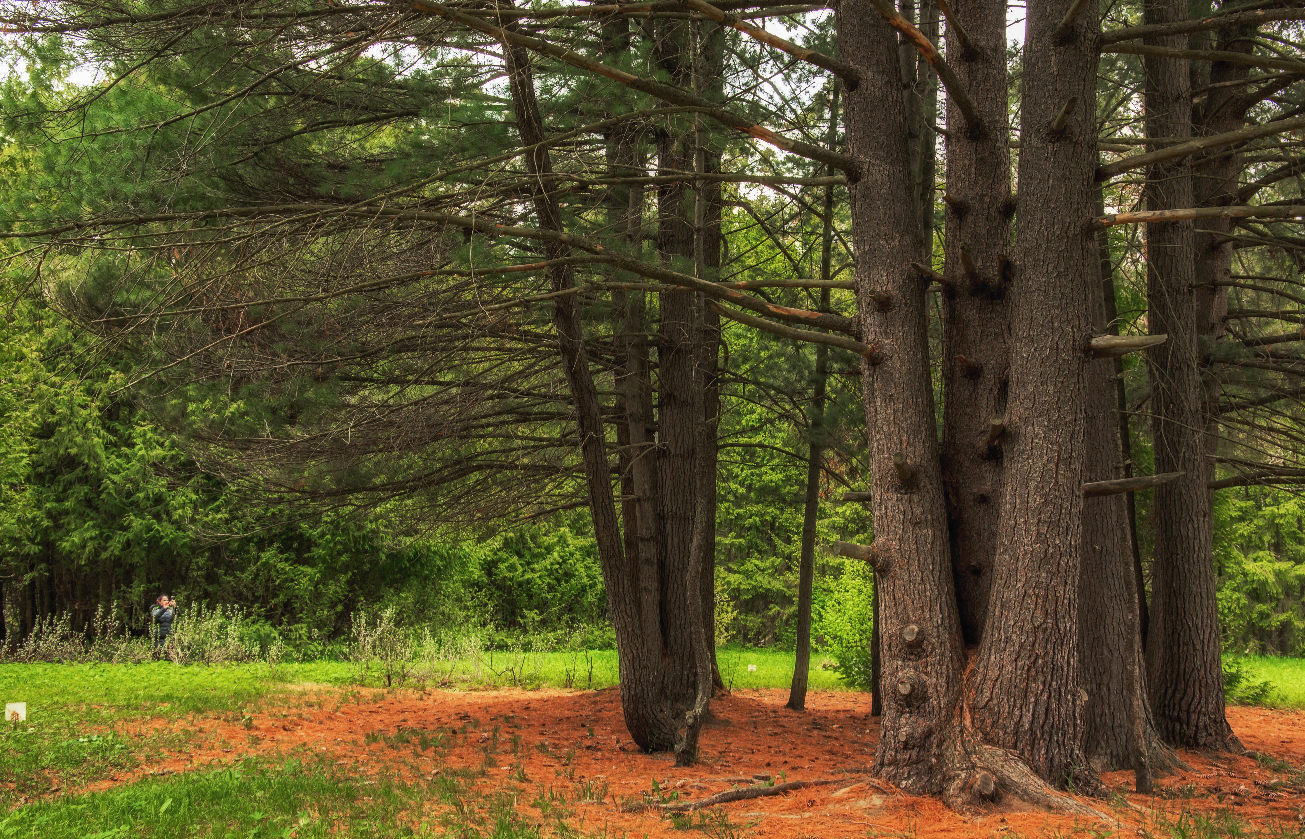 Дендрологический сад Волжско-Камского государственного заповедника: Садовый, Зеленодольский район, Татарстан This image is related to the protected area of Russia number 1630083